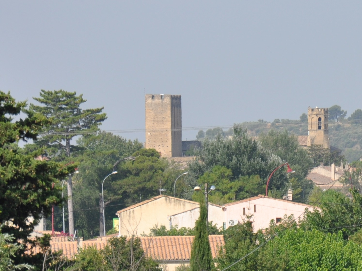 Ville entraigues et Mourre de Séve